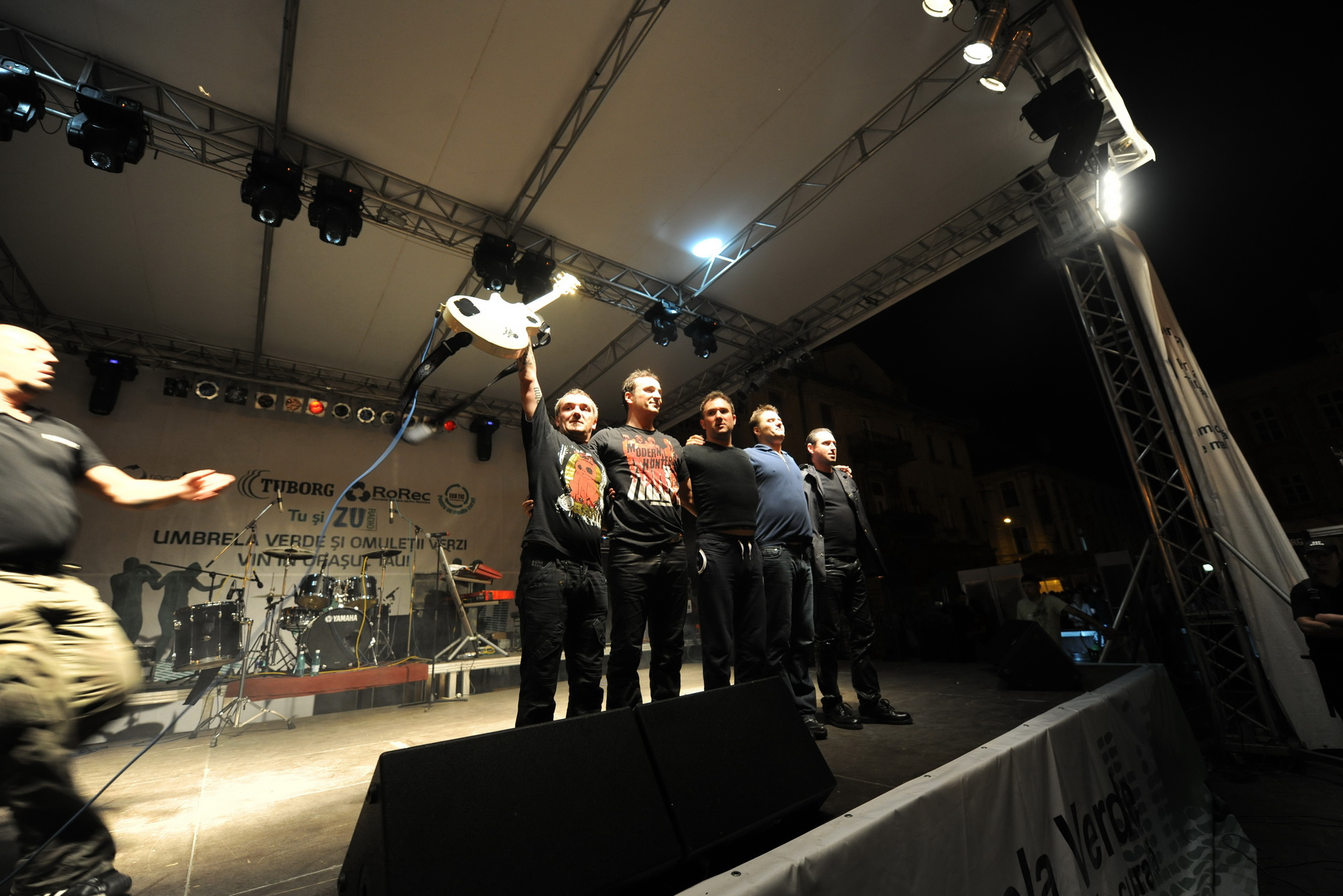 Directia 5 la Timisoara.